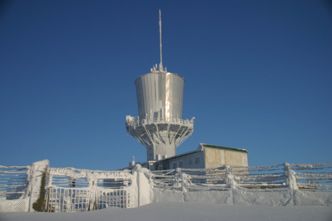 Dyleň im Januar 2006